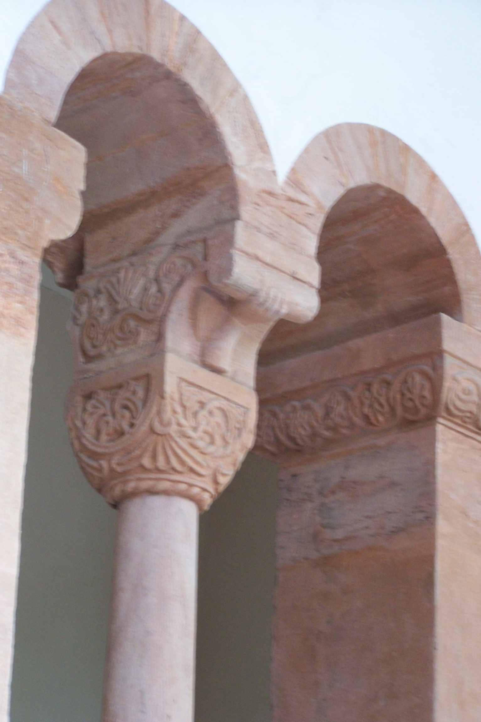 Romanisches Kapitel im Innern der Kirche.